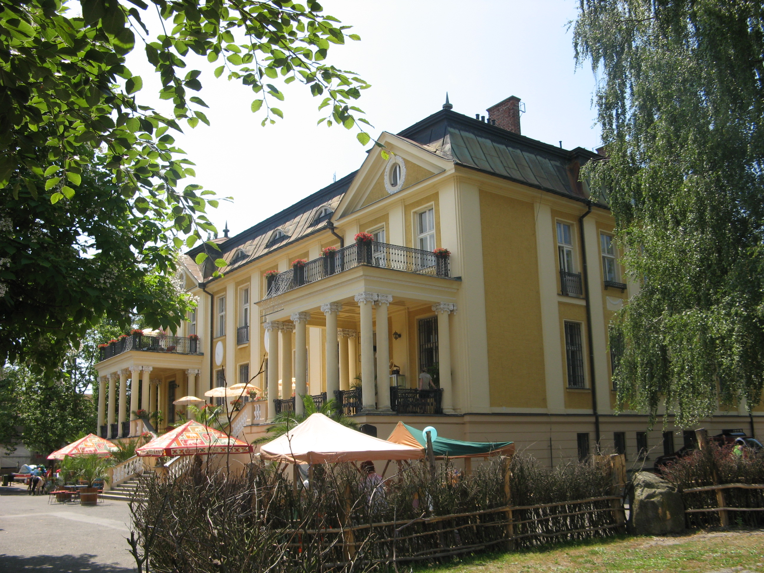 ZOO Dvůr Králové, Neumannova vila